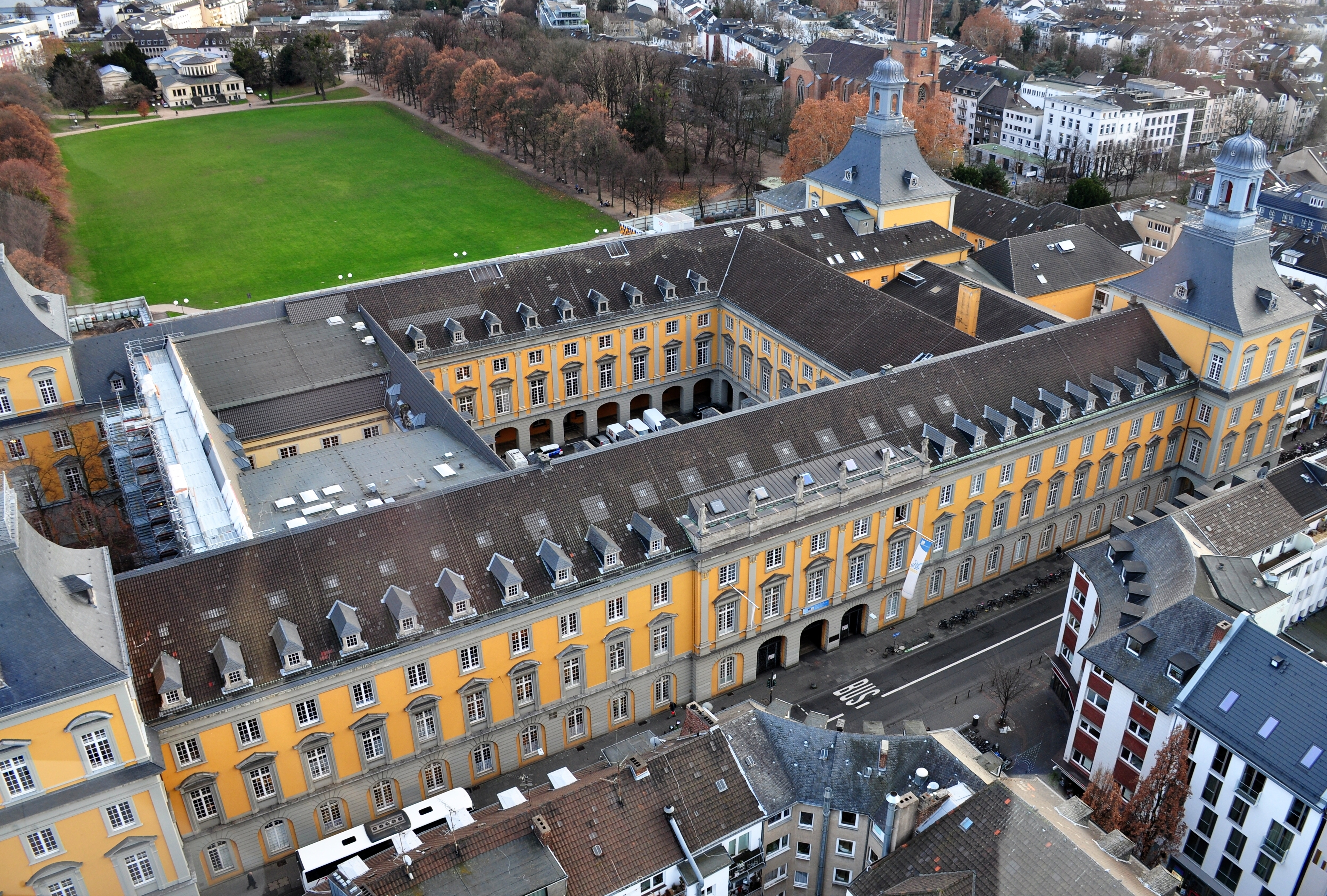 Universität – Vorderansicht mit Arkadenhof, dahinter Hofgarten und Akademisches Kunstmuseum